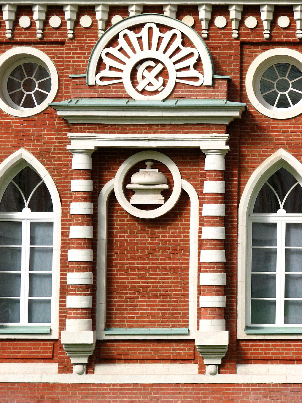 Деталь декора на стене Хлебного дома